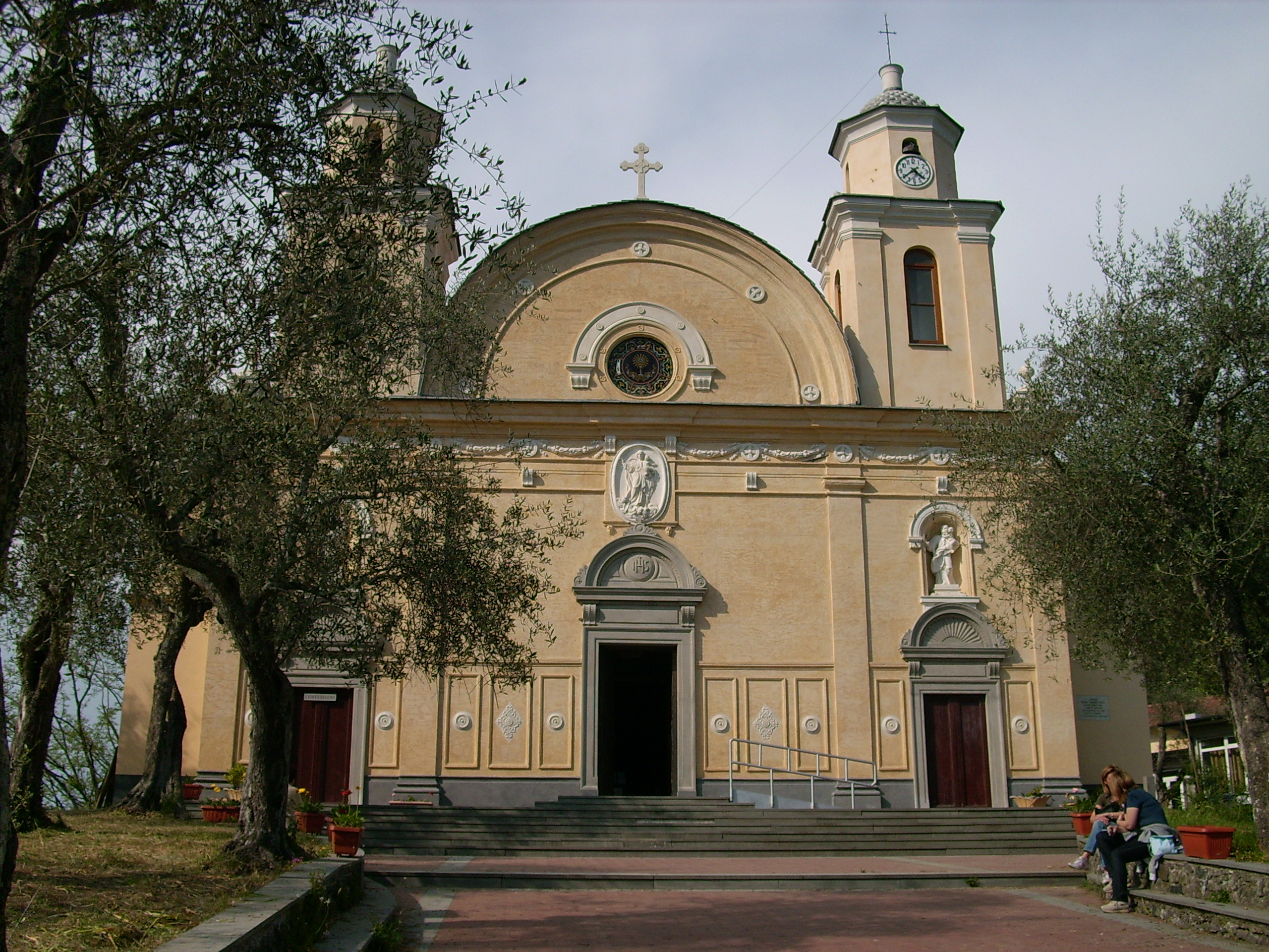 Santuario della Madonna di Roverano di Borghetto di Vara, Liguria, Italia